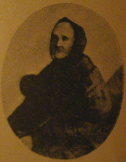 Retrato de María Mercedes Coronel de Paso (1777-1854)